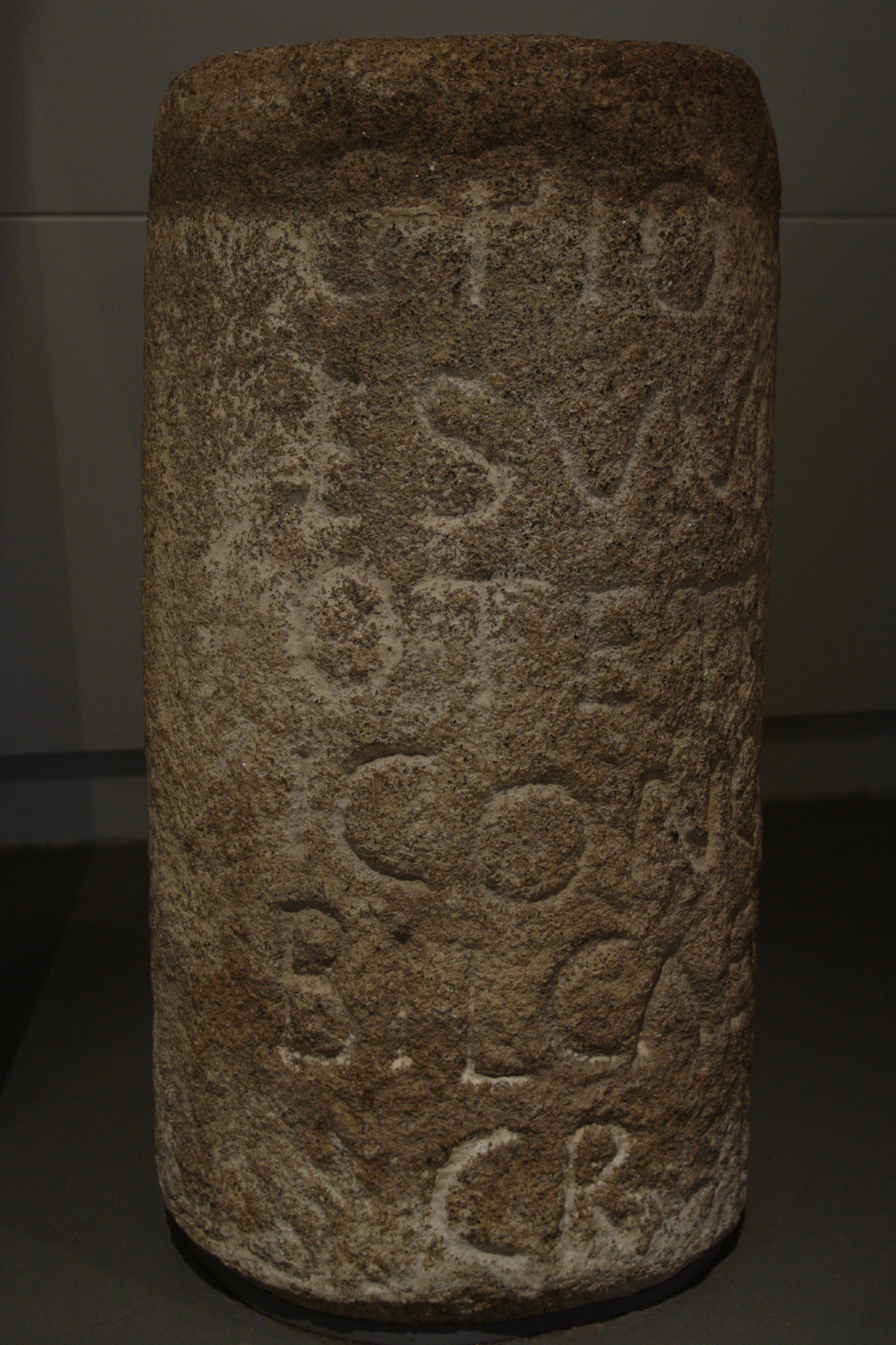 Borne milliaire, découverte par M. de Penhouet en 1834, qui servait de support de bénitier dans l'église de Saint-Gondran (Ille-et-Vilaine). Elle est dédiée à Tetricus II.